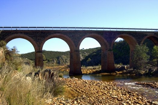 El puente Oraque en Villanueva de las Cruces.